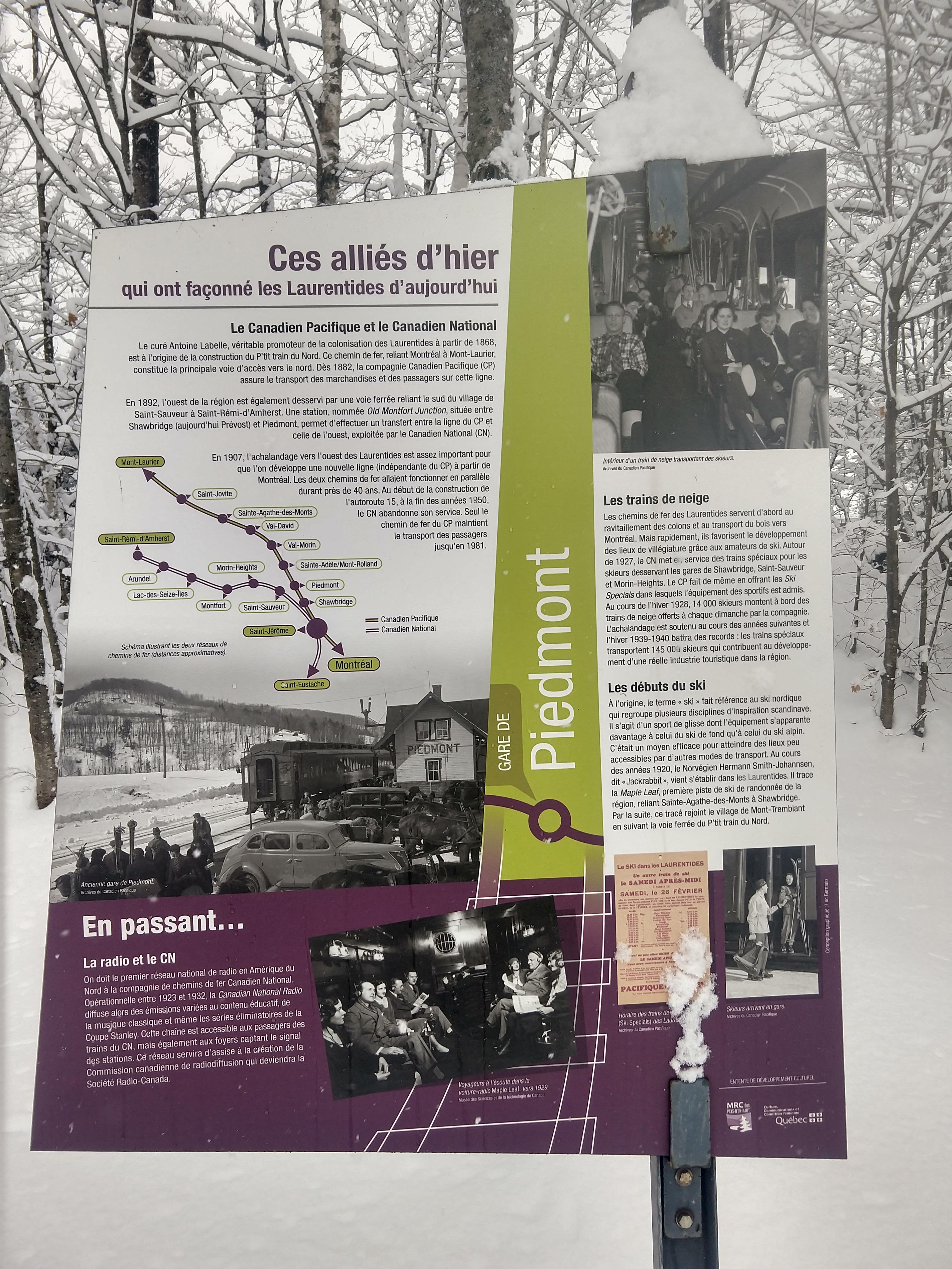 Panneau historique à la gare Prévost décrivant l'évolution du chemin de fer.